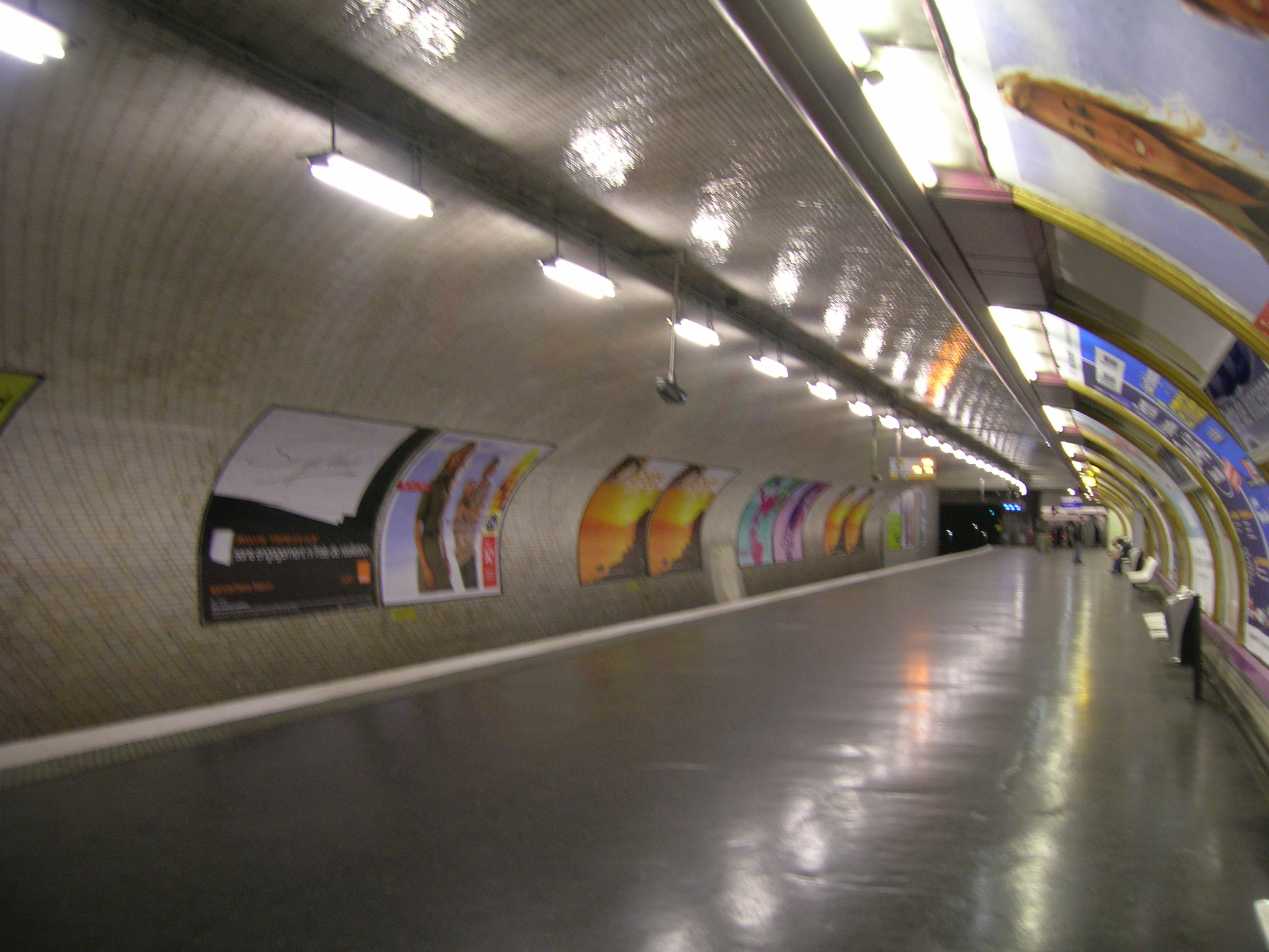 Le quai direction Château de Vincennes de la station Porte de Vincennes de la ligne 1 du métro de Paris, France